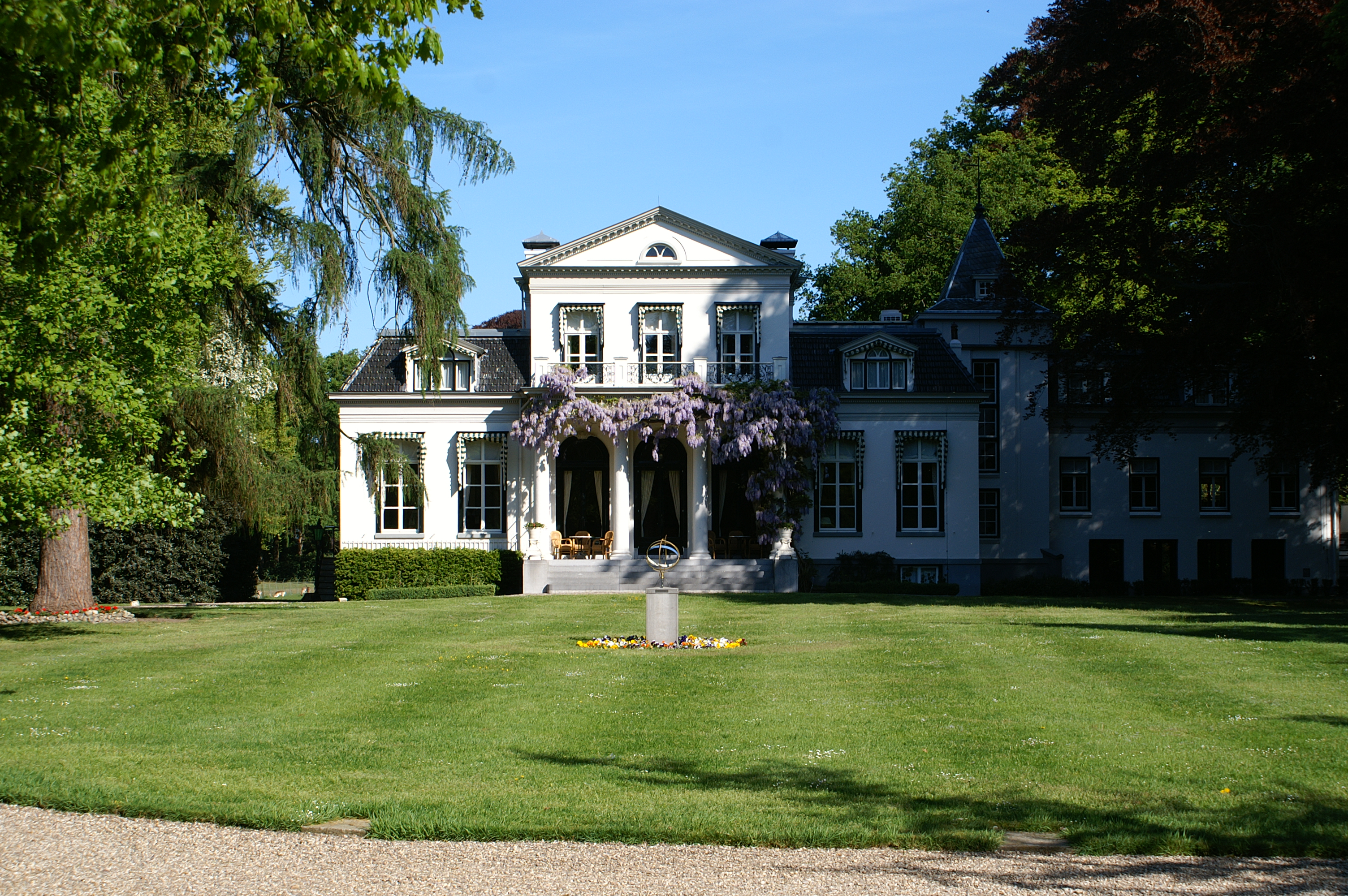 Huize Oranjewoud te Oranjewoud.